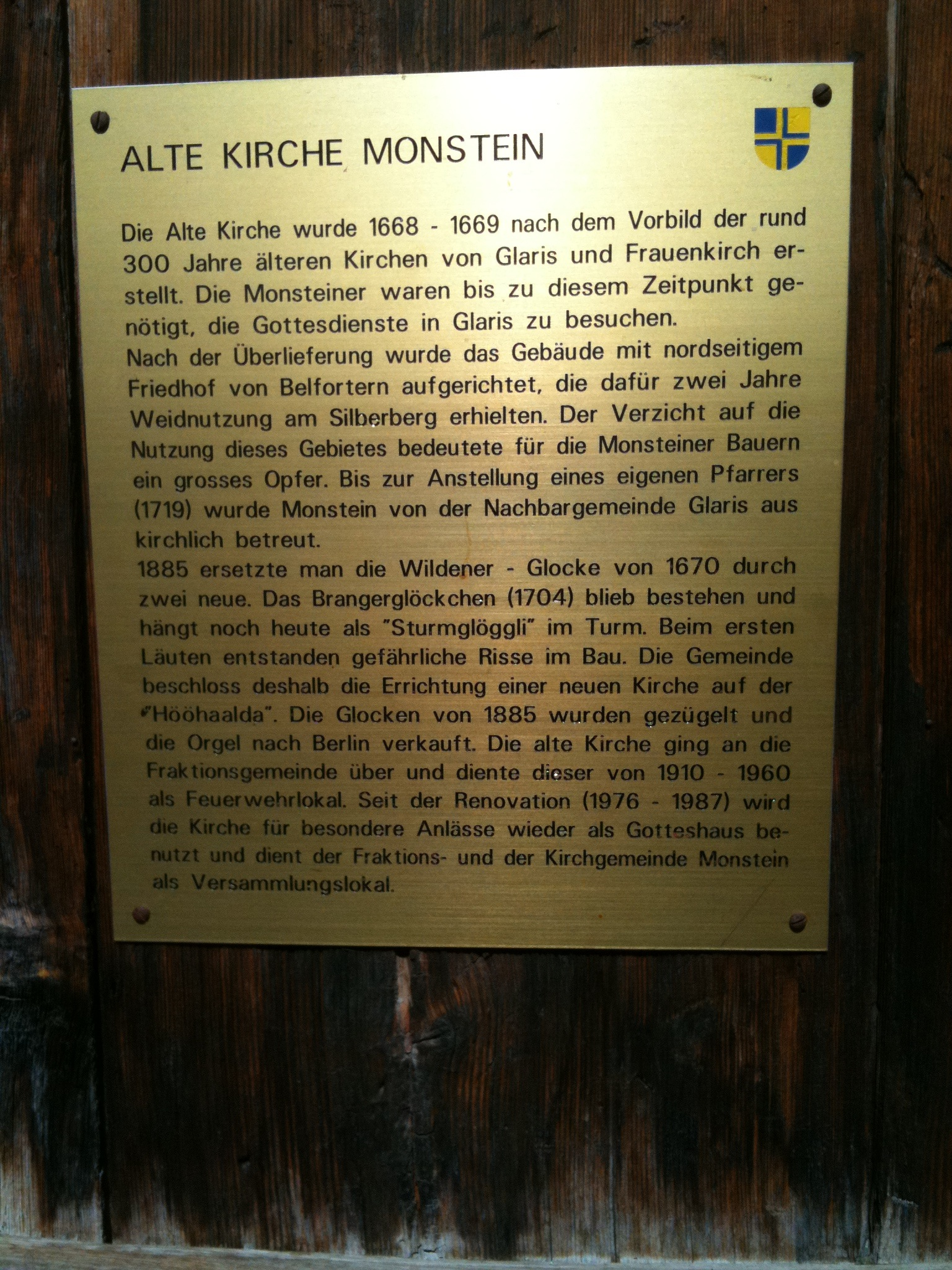 Informationstafel an der Eingangstüre der Alten Kirche Davos Monstein (Kanton Graubünden)